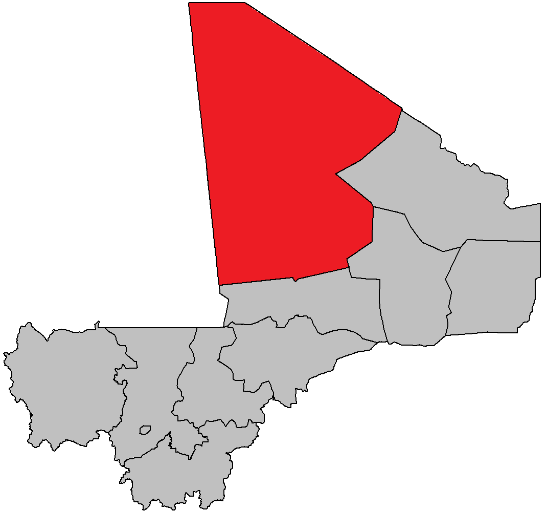 マリ共和国タウデニ州のおおよその範囲（2016年） 参考資料-Active USG Programme for the Mali Response (Last updated 09.14.17) from US Agency for International DevelopmentMali: Aperçu de l’accès humanitaire (bilan des contraintes de janvier à décembre 2017) from UN Office for the Coordination of Humanitarian Affairs